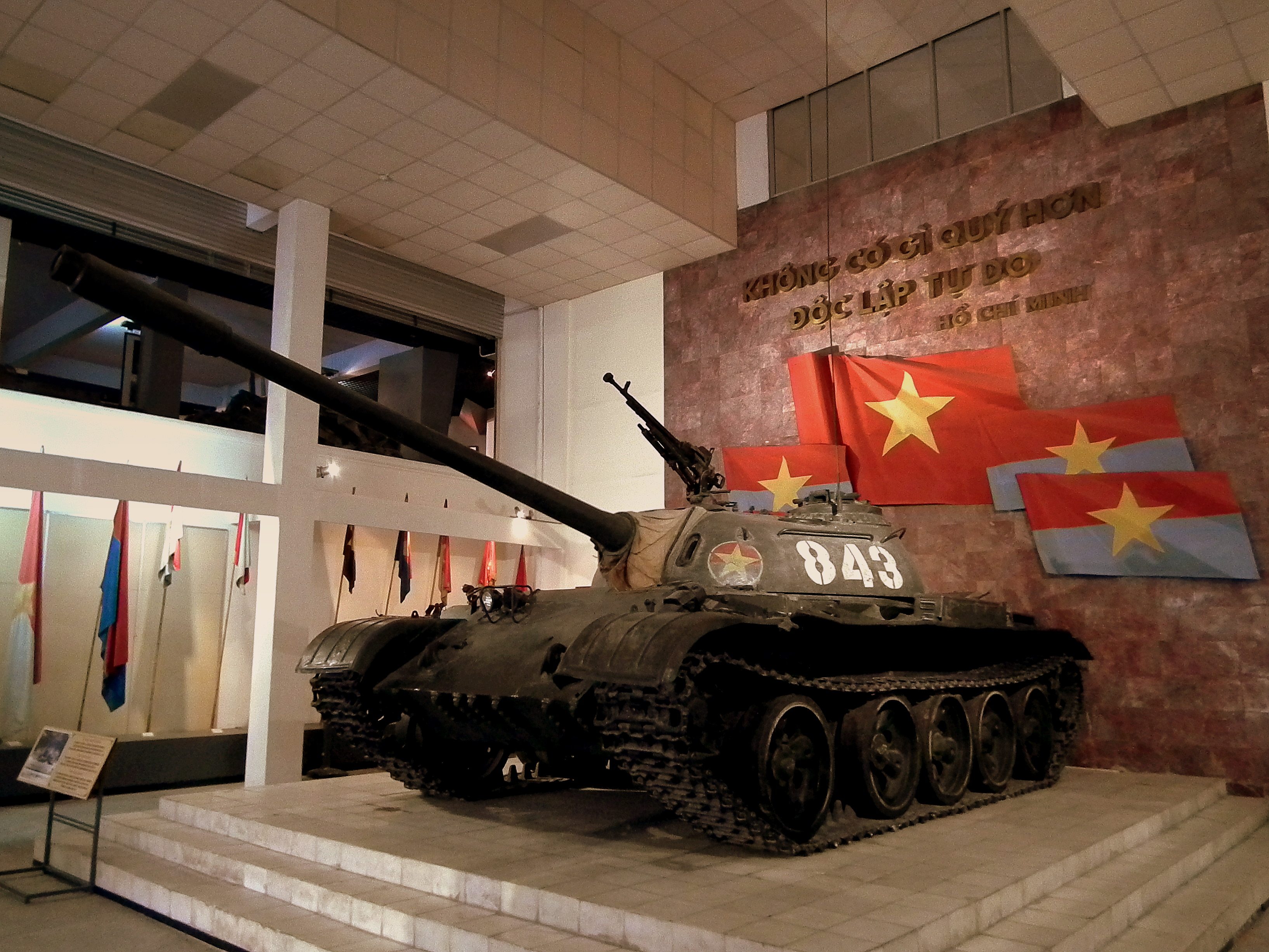 ARMY MUSEUM HANOI VIETNAM FEB 2012